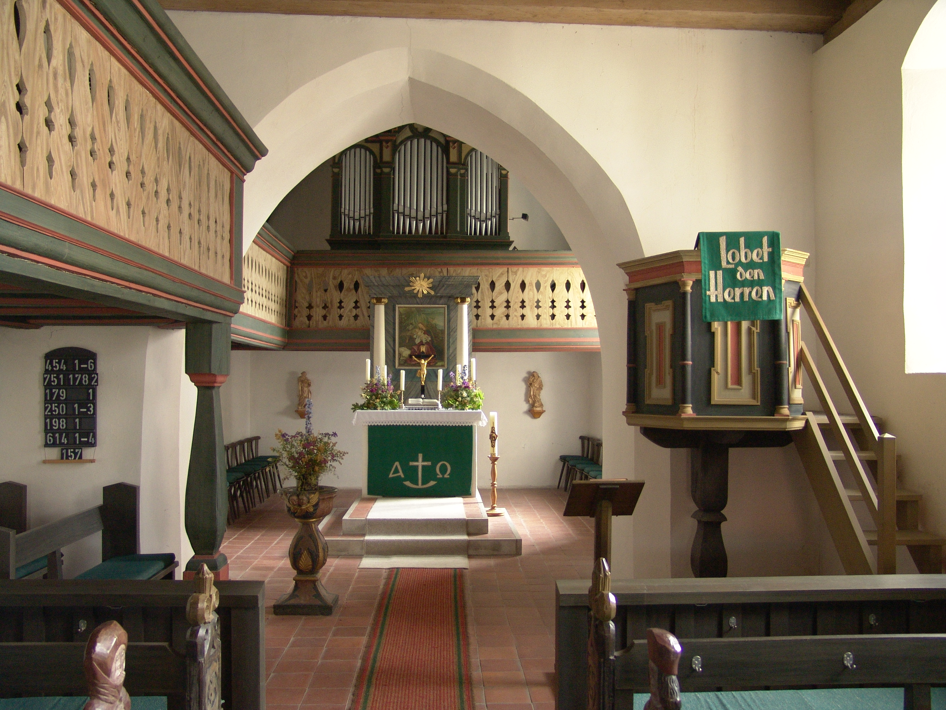 evang.-luth. Kirche Zu unserer lieben Frau in Hagenau